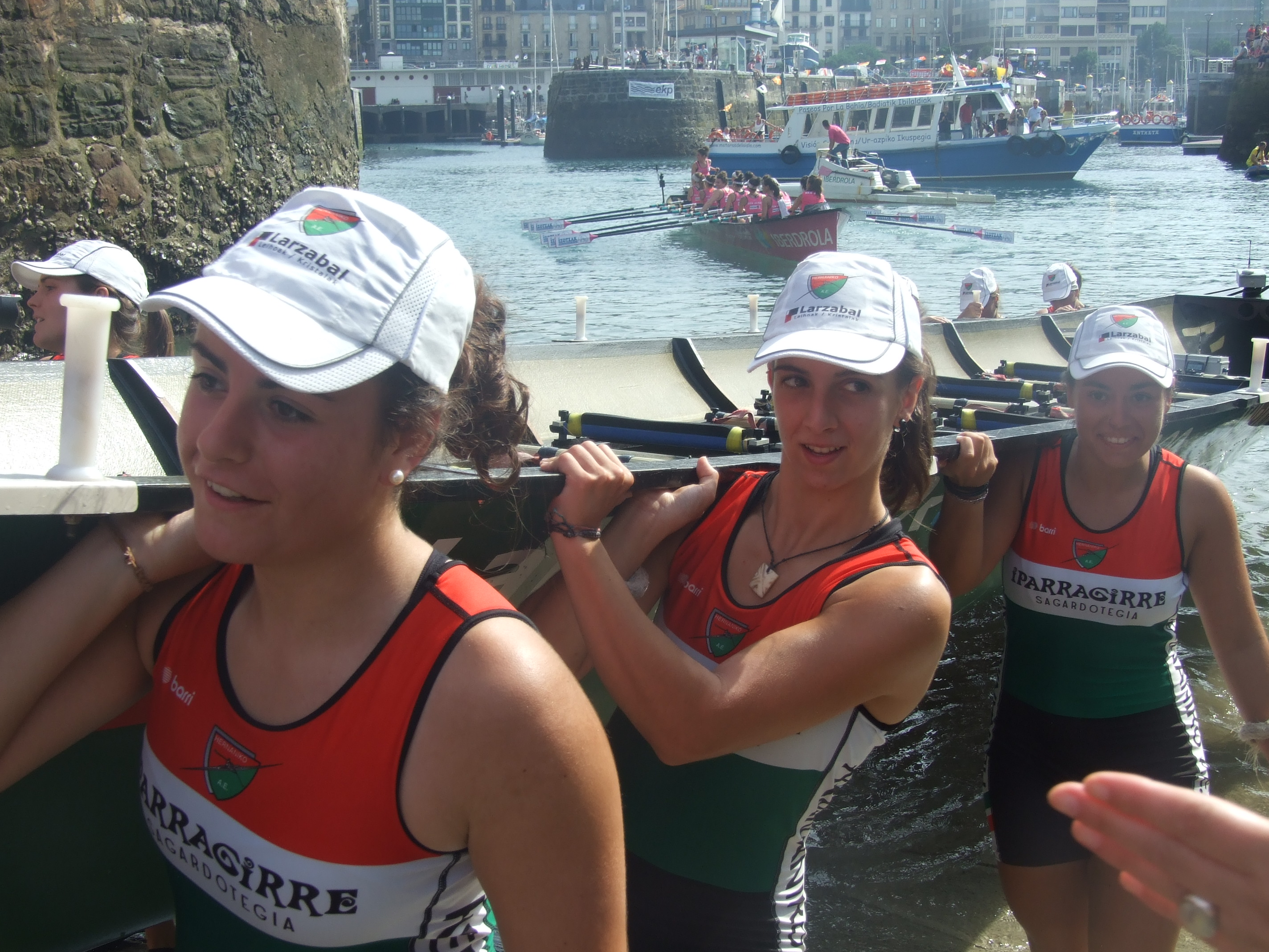 Bandera de la Concha 2016